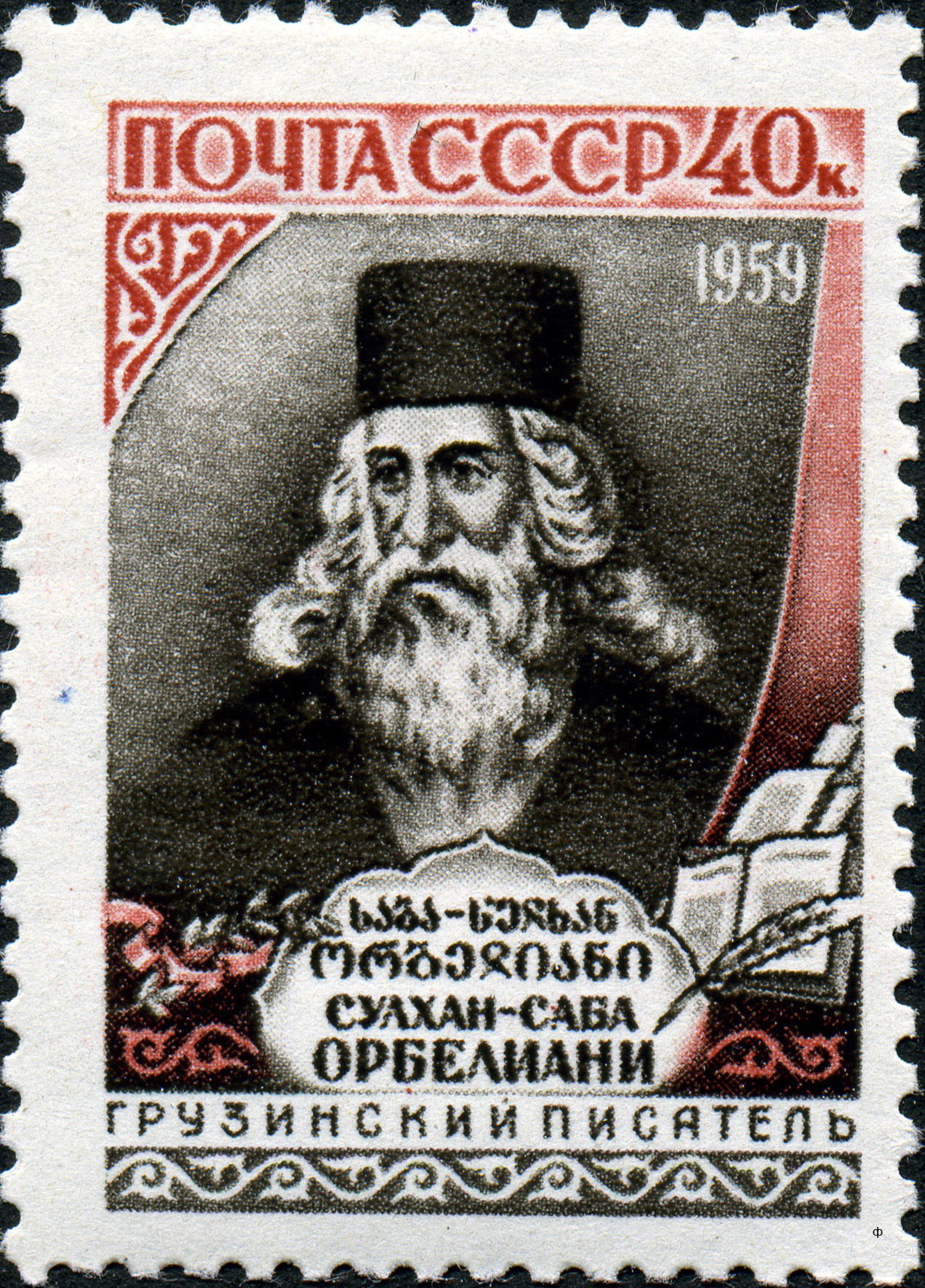 Марка СССР